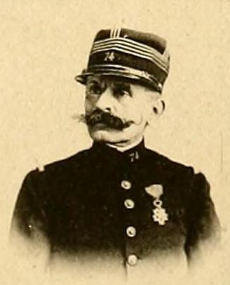 "Commandant Esterhazy"